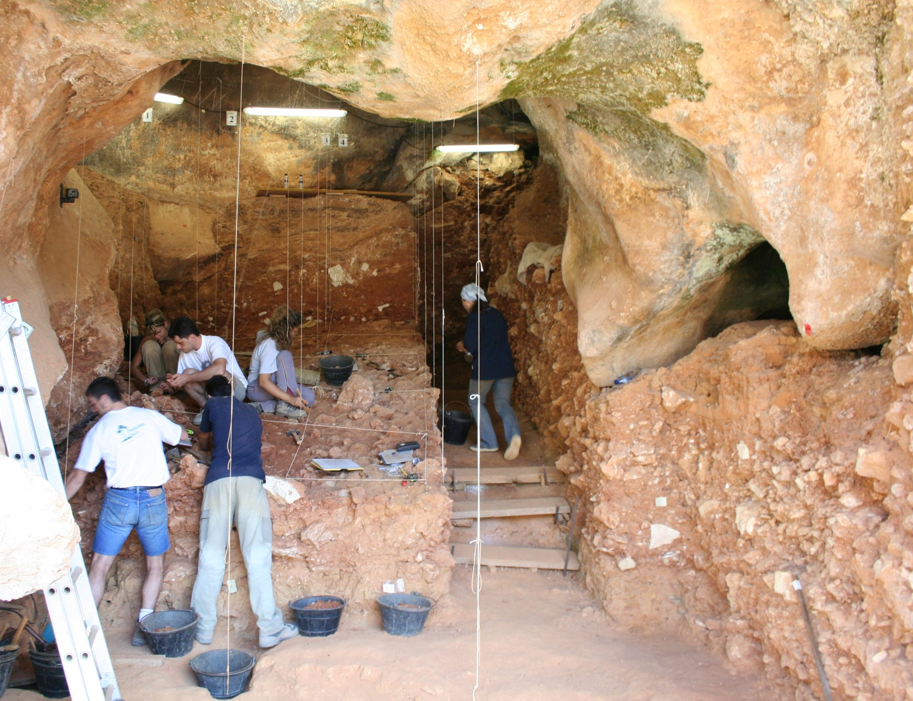 Trinchera Zarpazos en la campaña de 2006